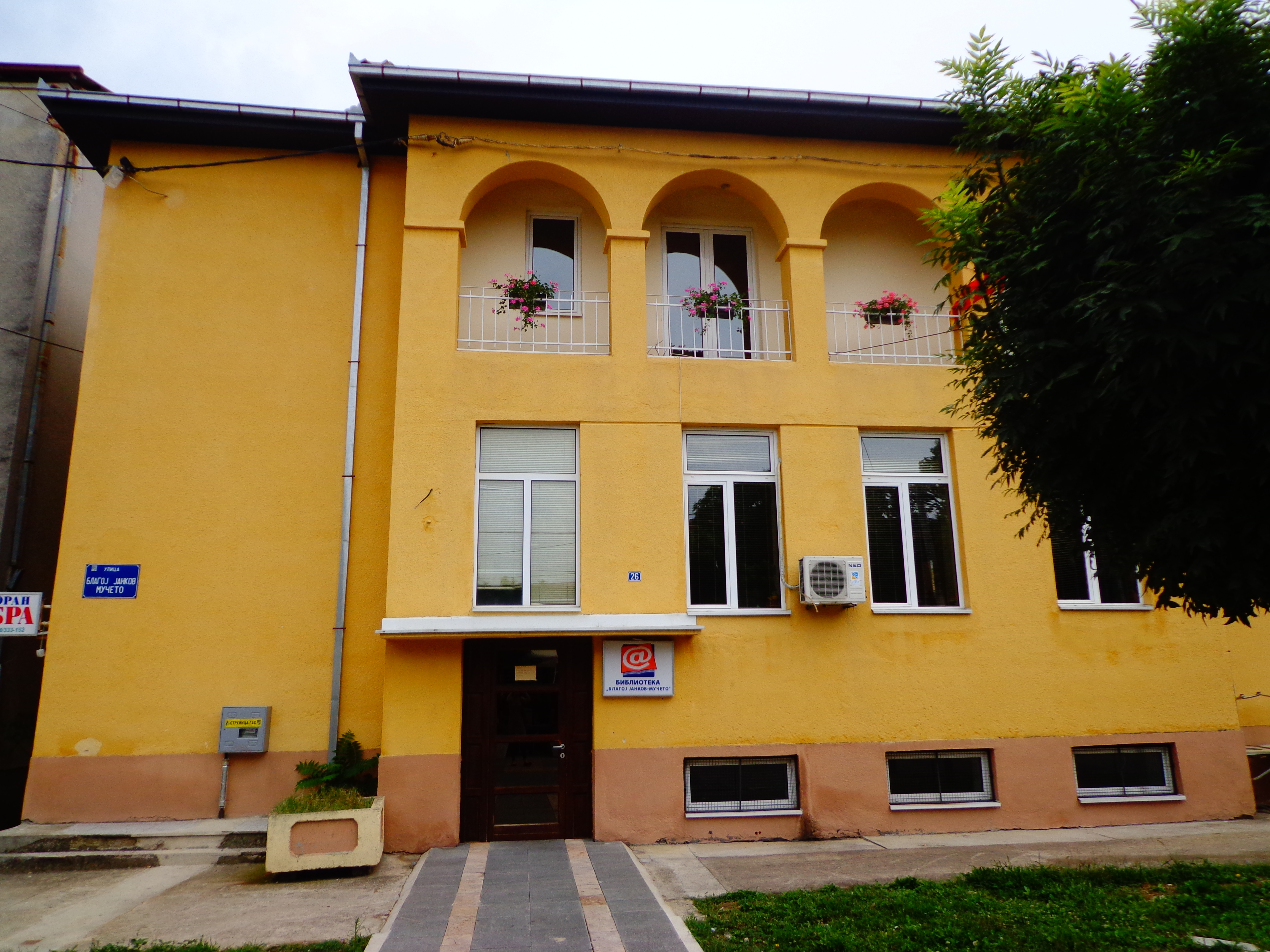 Струмица - Р. Македонија , Strumica - R. of Macedonia